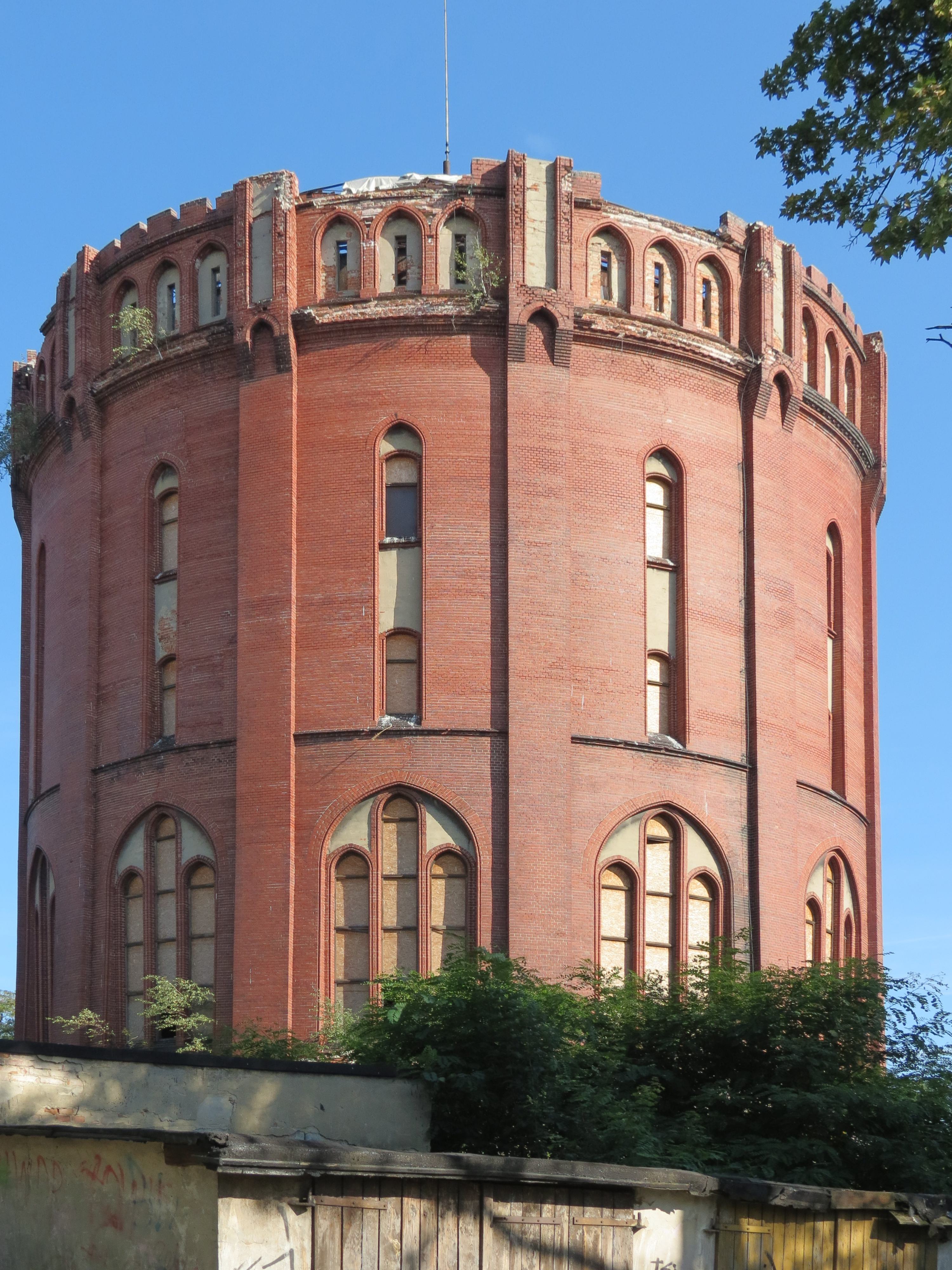 Wieża ciśnień z ok. 1918 roku; Gliwice, ul. Jana III Sobieskiego